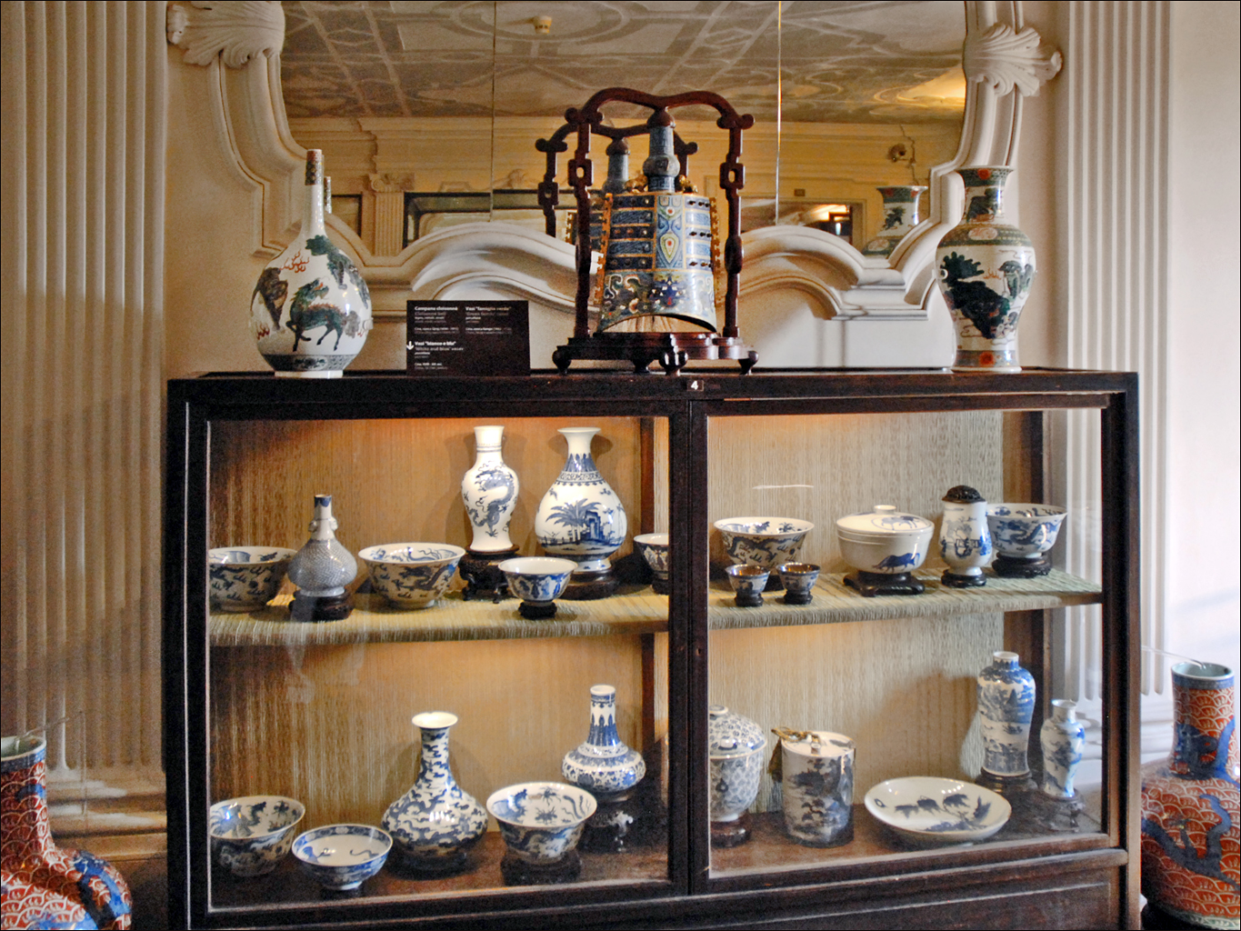 Porcelaines de Chine Dans la vitrine, des vases "blancs et bleus" en porcelaine XVIIIè-XIXè siècles Au-dessus de la vitrine : - Cloche cloisonnée (métal, bois, émaux) au centre époque Qing (1644-1911) - Deux vases (famille verte) en porcelaine époque Kangxi (1662-1722) site du musée d'art oriental